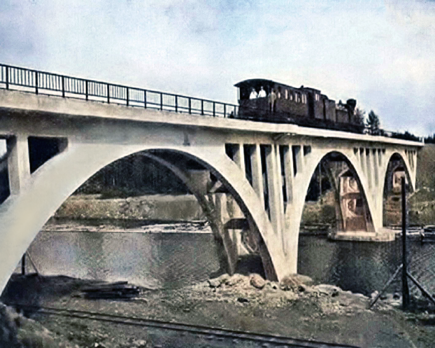 Железнодородный мост через Янисйоки. Лето 1926 год.